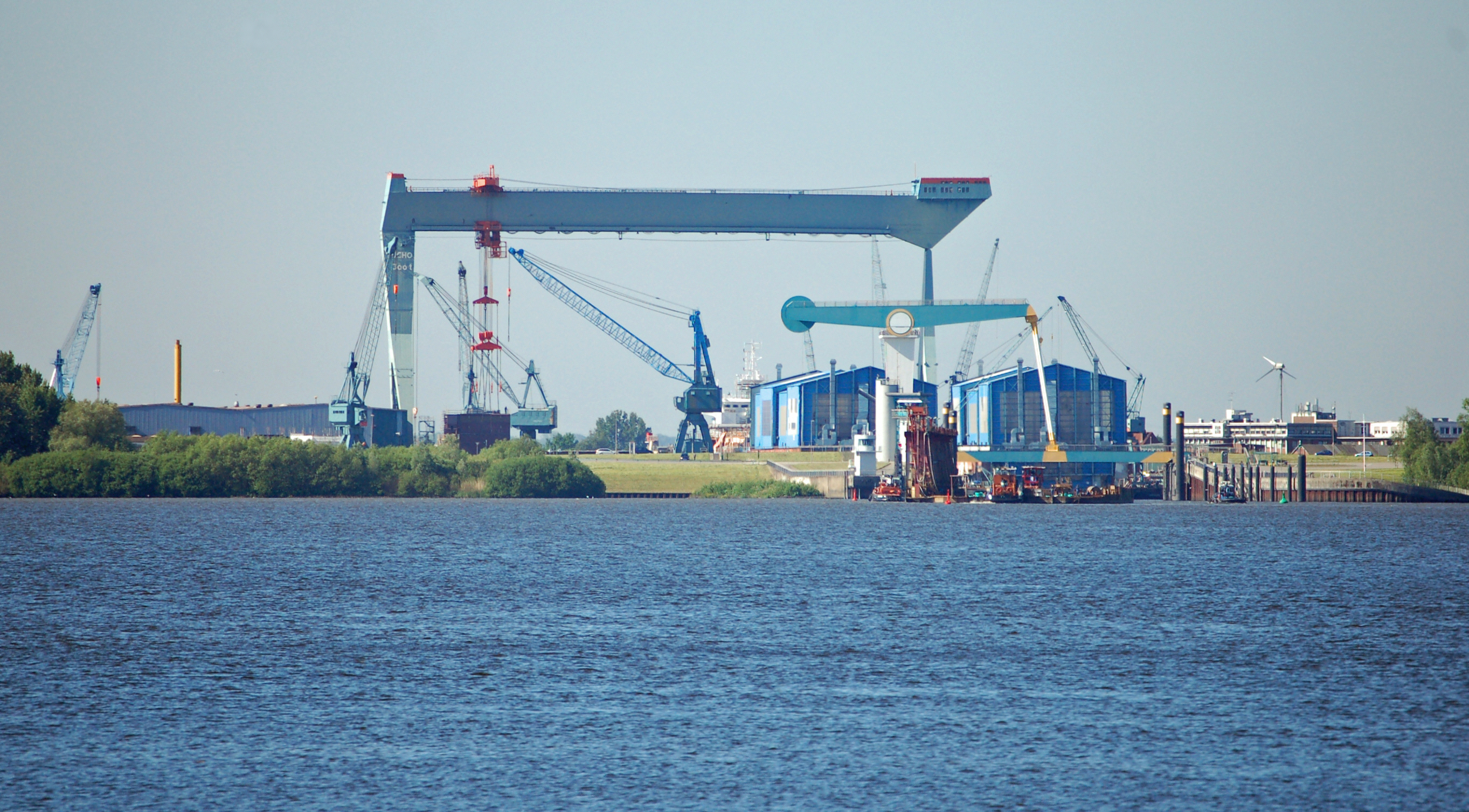 Die Sietas-Werft in Hamburg-Neuenfelde